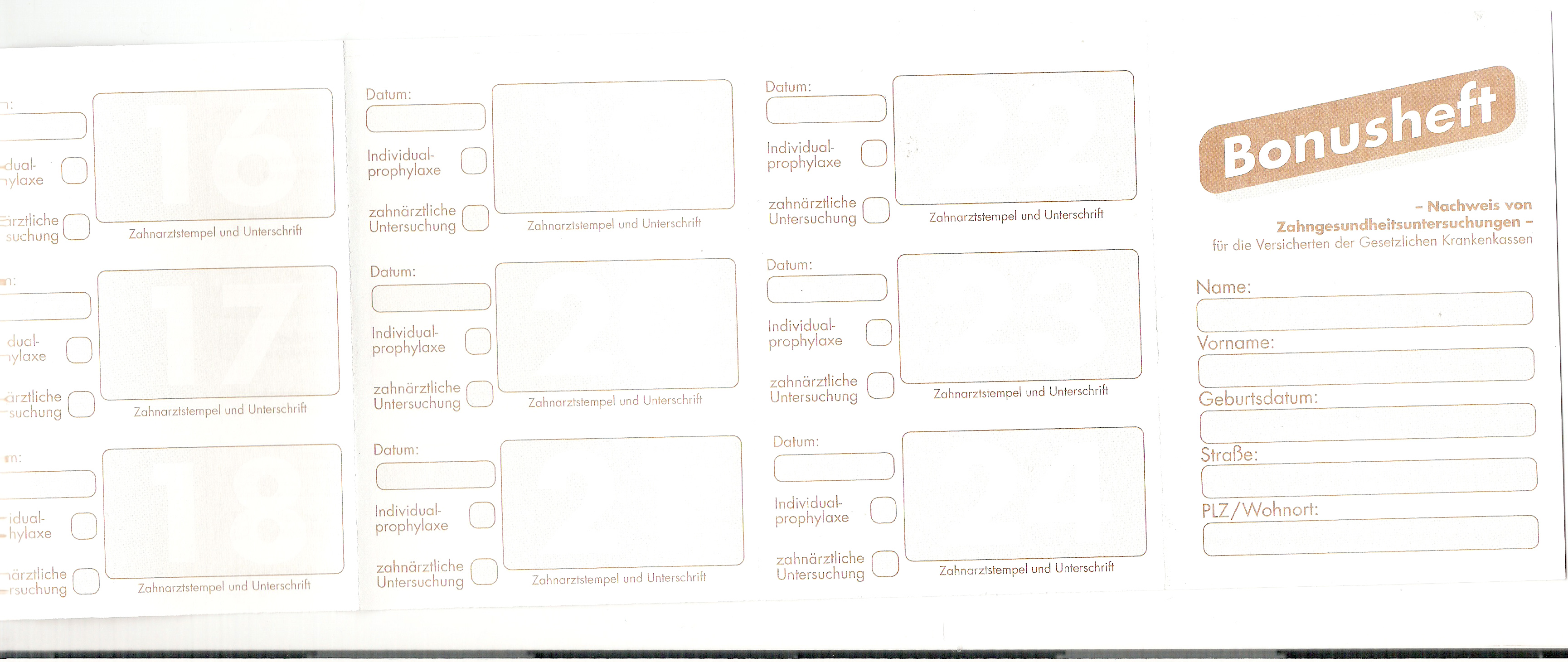 Bonusheft, Zahnersatz, Zahnarzt, Krankenkasse